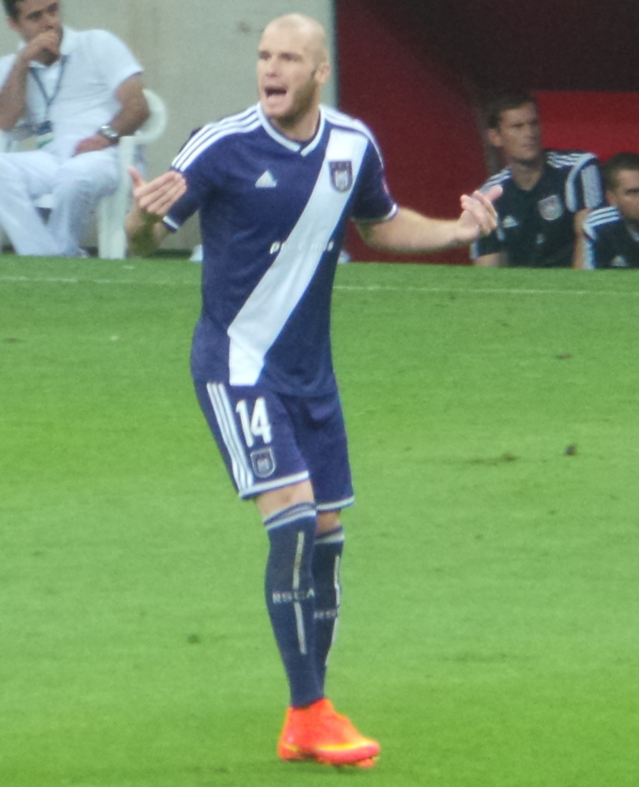 Bram Nuytinck in 14